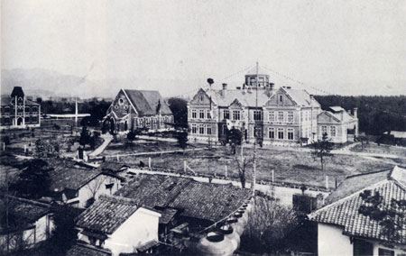 1890年7月の同志社のキャンパス